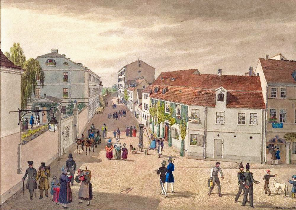 Das Naundörfchen in Leipzig auf einem Aquarell von 1858